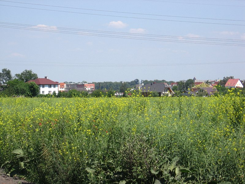 Wrocław, Poland